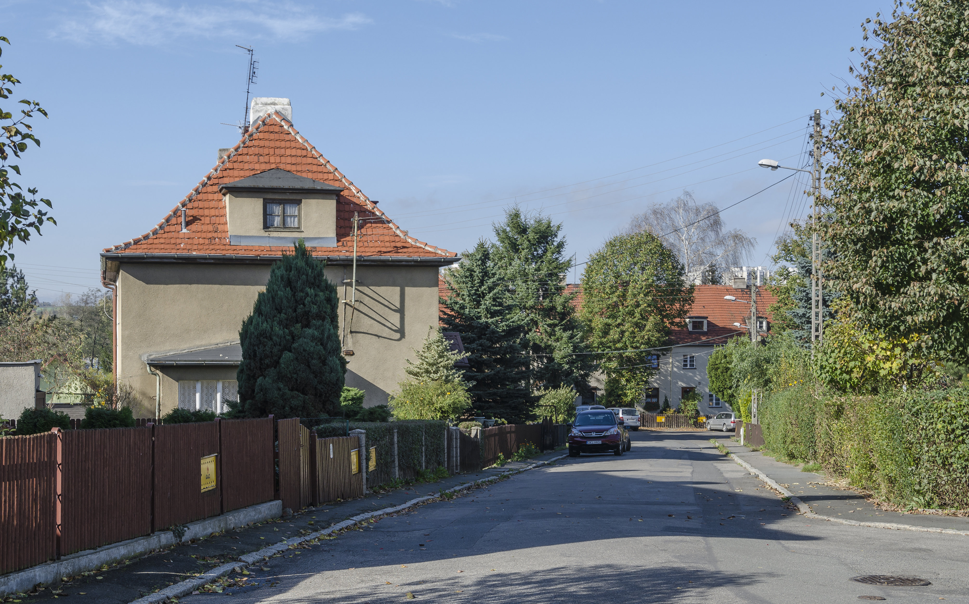 Kłodzko, ul. Tetmajera